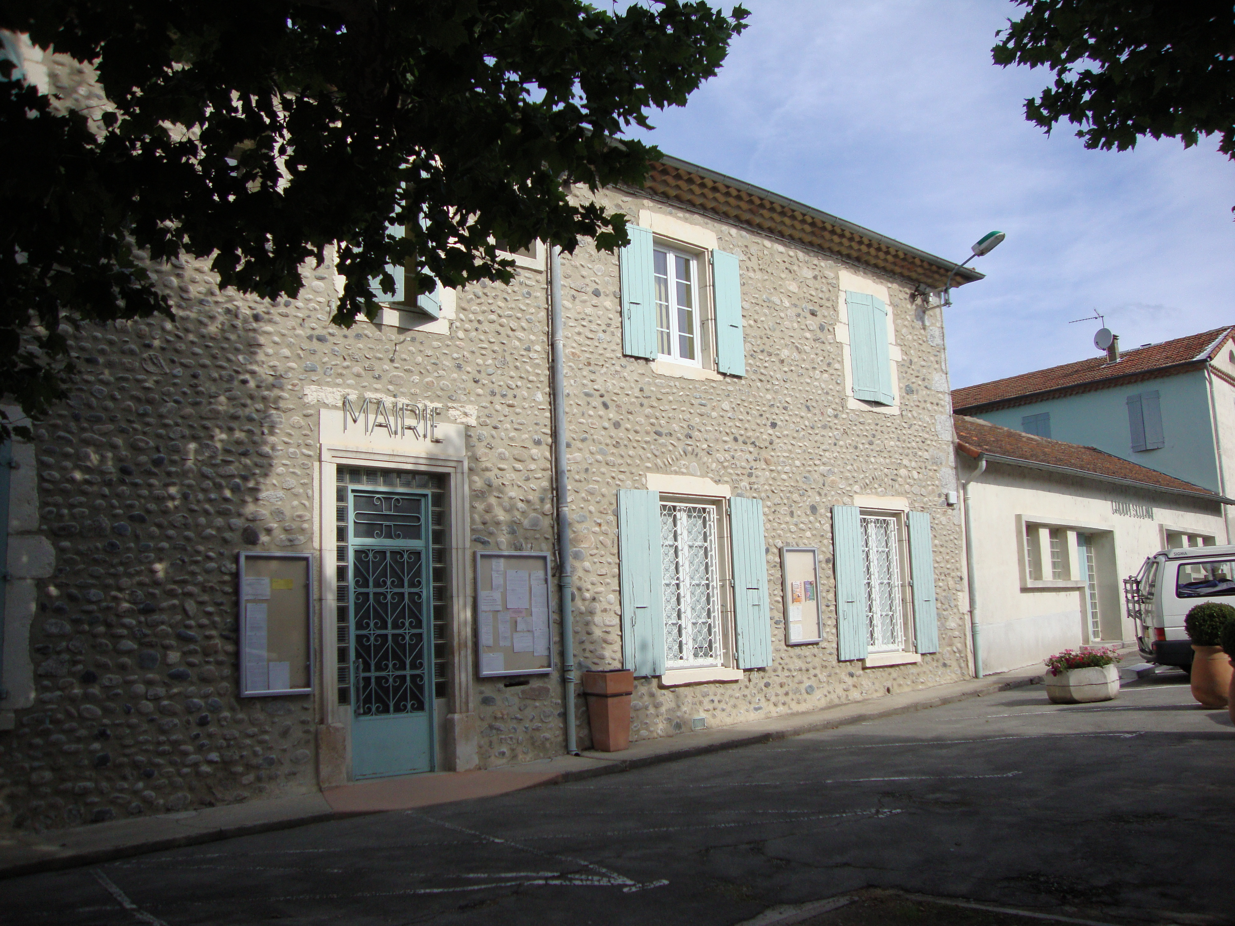 Saint-Laurent-du-Pape (Ardèche, Fr) mairie-école